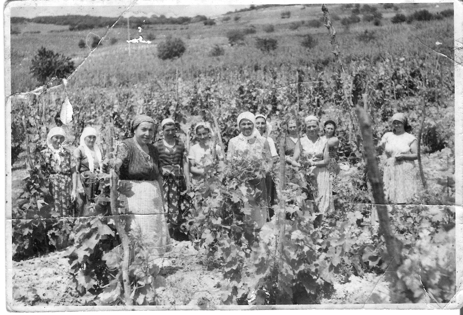 Едно звено работнички в лозята на село Оброчище, 1957 г.